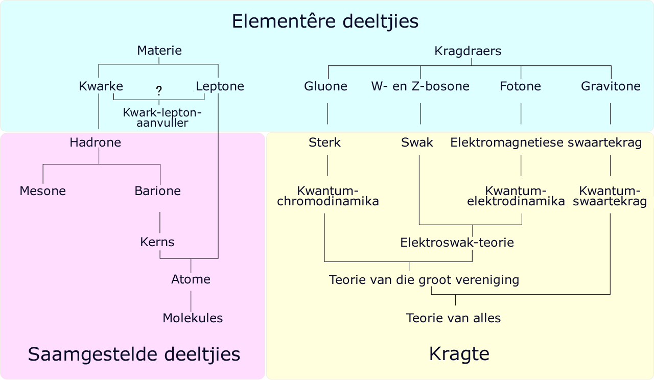 'n Oorsig van deeltjiefisika